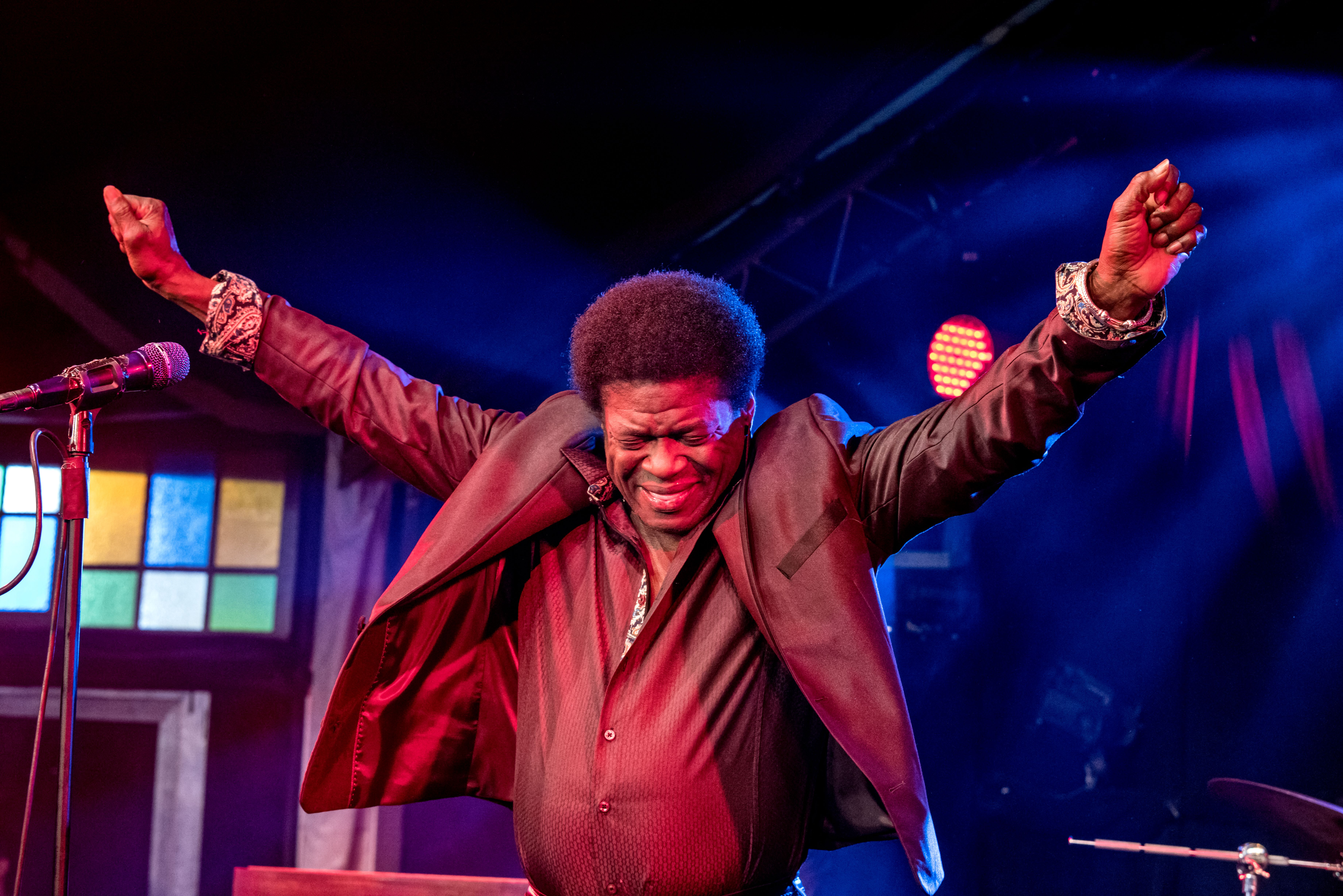 Bilder vom Zelt Musik Festival 2016 in Freiburg im Breisgau Der Soulsänger Charles Bradley